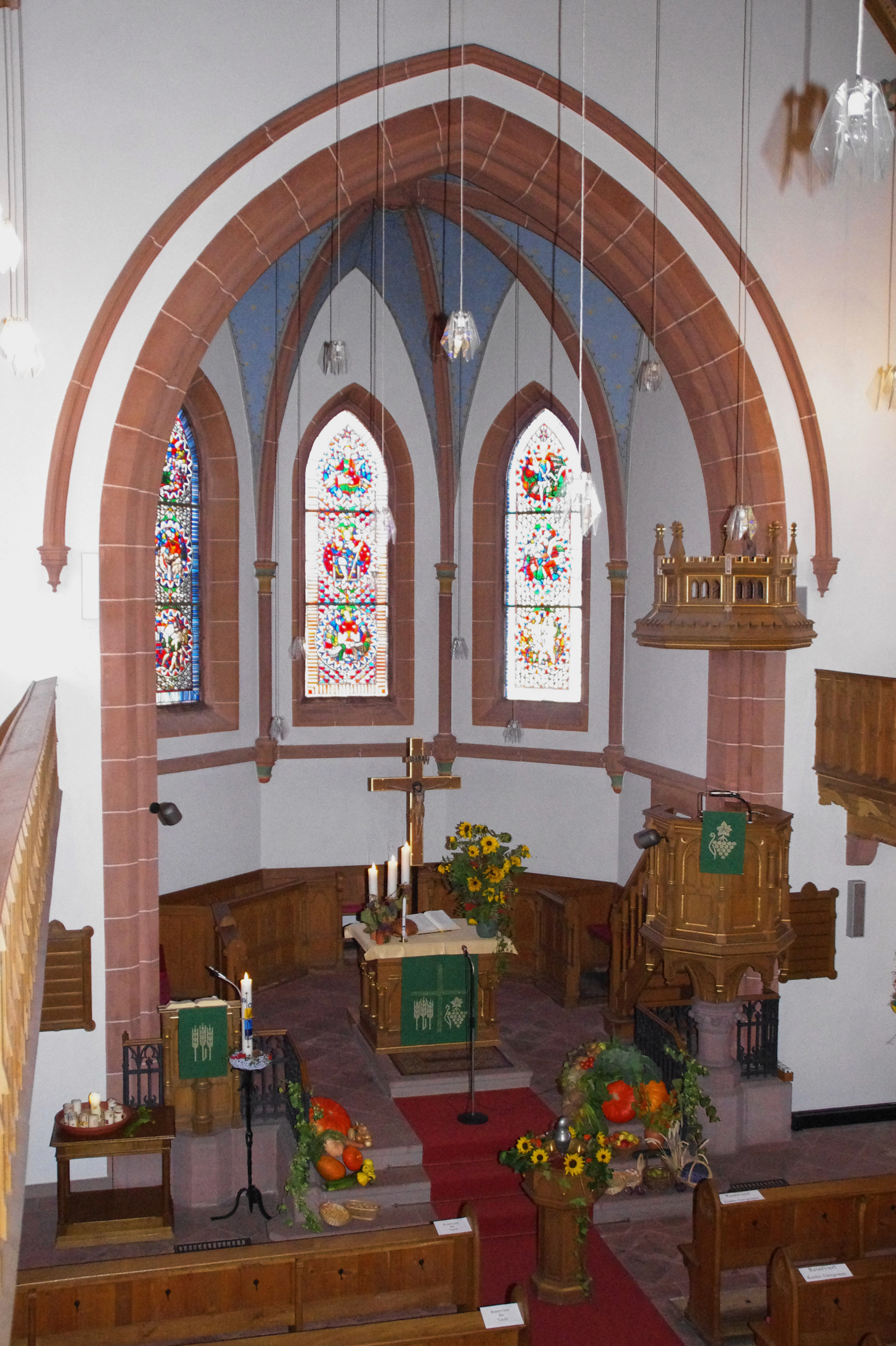 Kirche in Annerod, Fernwald, Landkreis Gießen, Hessen